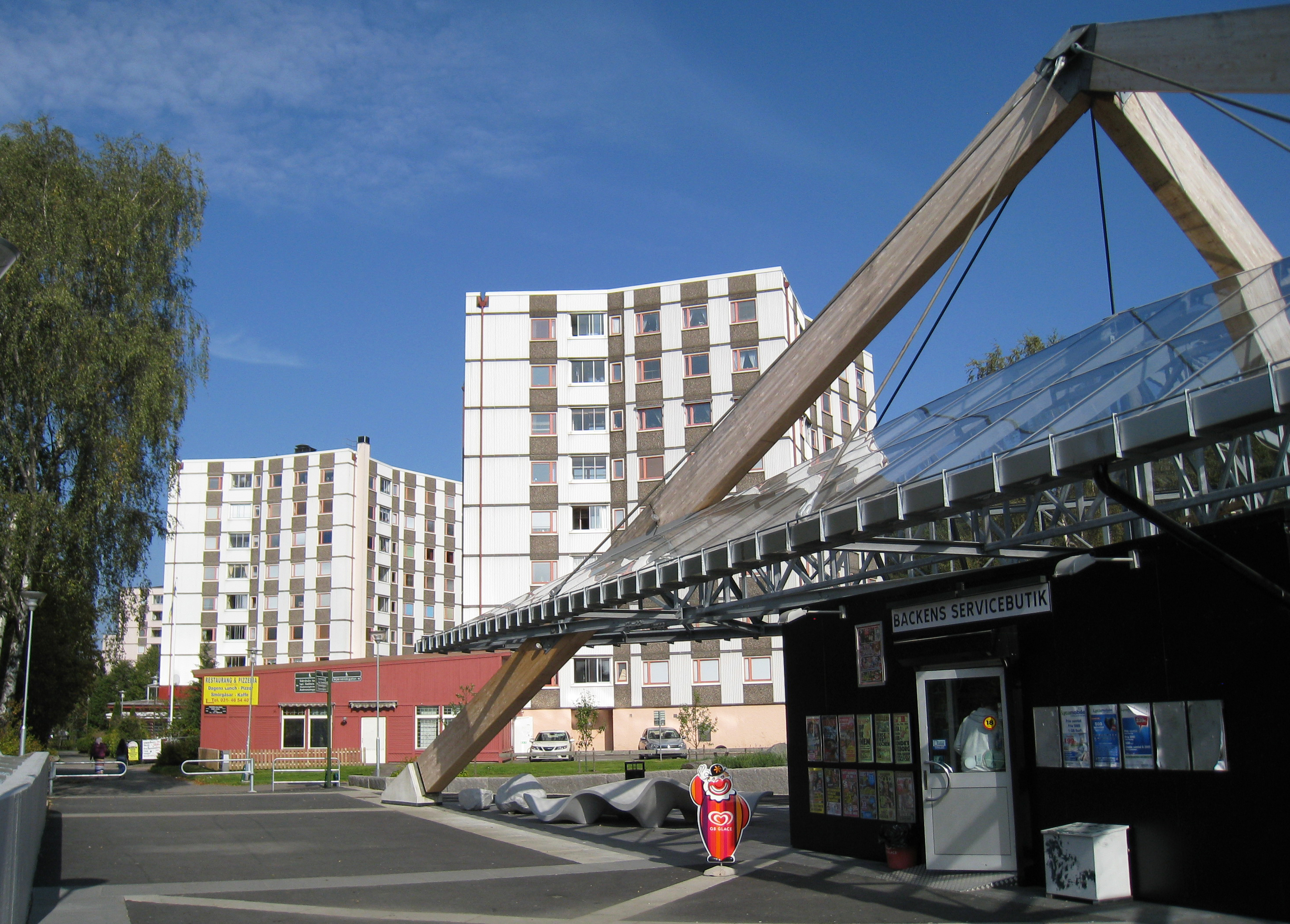 Newsagent at housing estate. Teleskopgatan, Bergsjön, Göteborg